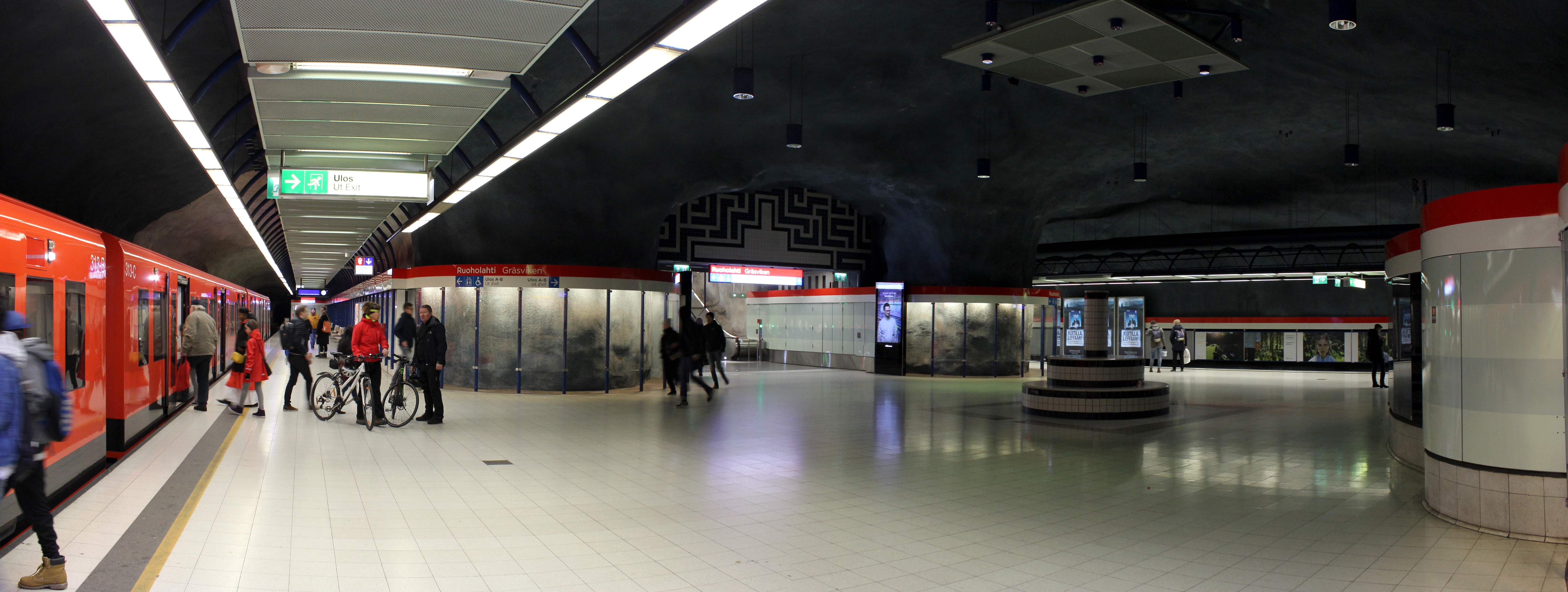 Ruoholahden metroasema marraskuussa 2017.